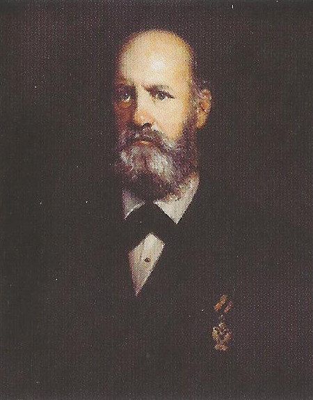 Porträt von Ignaz Heger (1824–1880), Rektor der Technischen Hochschule Wien